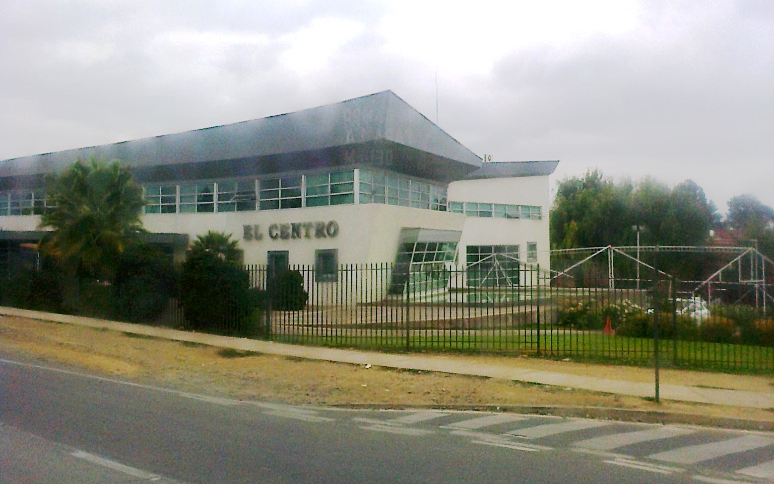 Casa matriz del matutino El Centro de Talca.